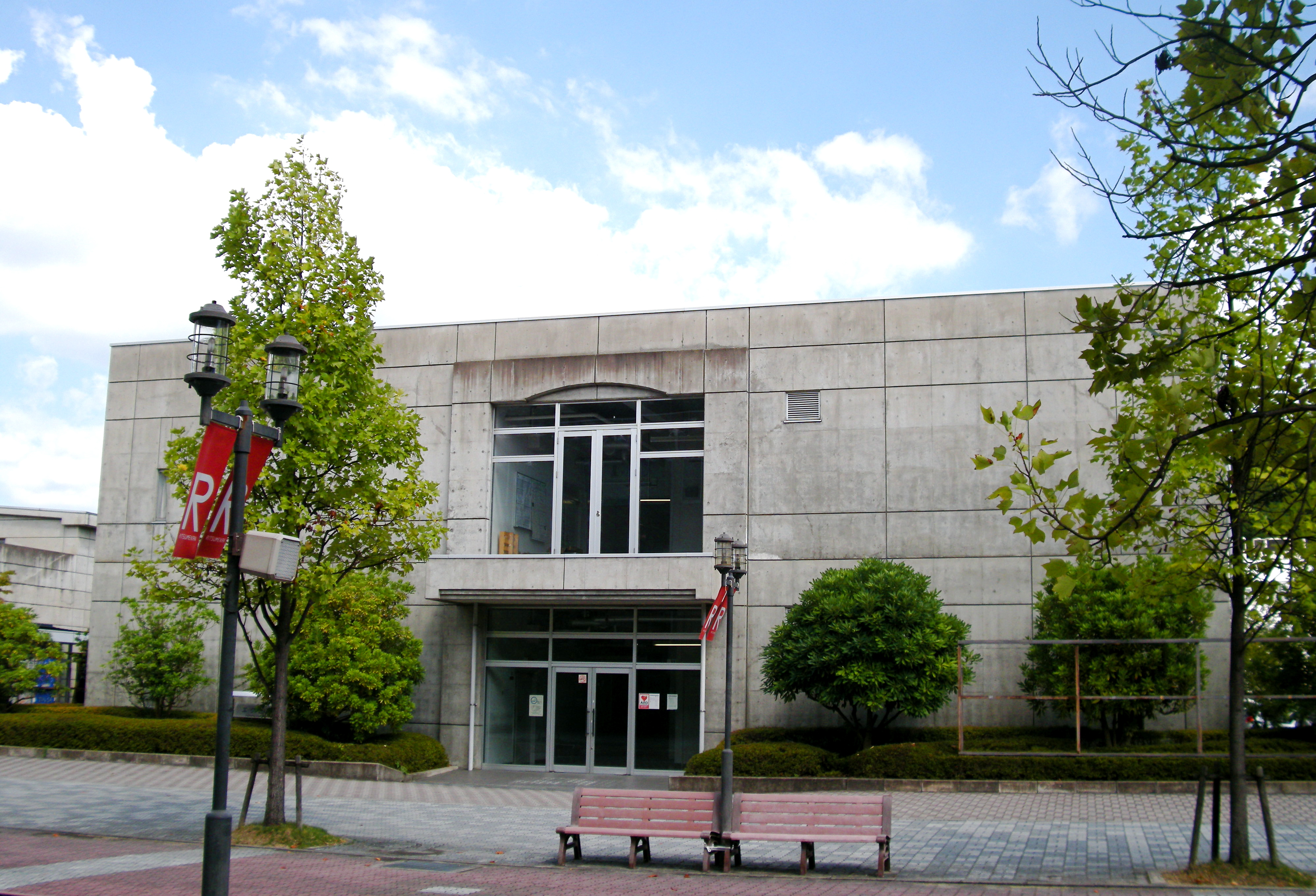 EXL-1 (Biwako Kusatsu Campus, Ritsumeikan University, Japan)